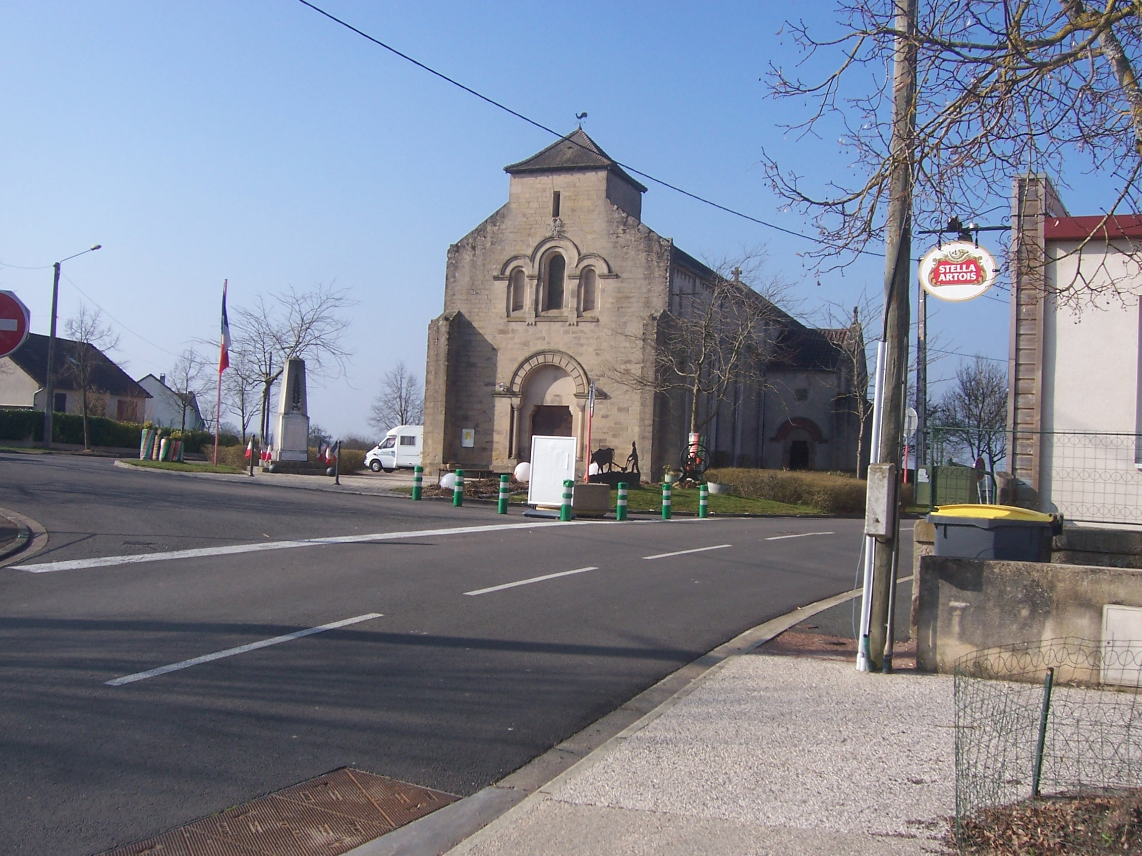 Eglise des Bizots